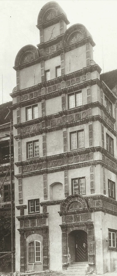 Schloss zu Gadebusch, Giebelseite